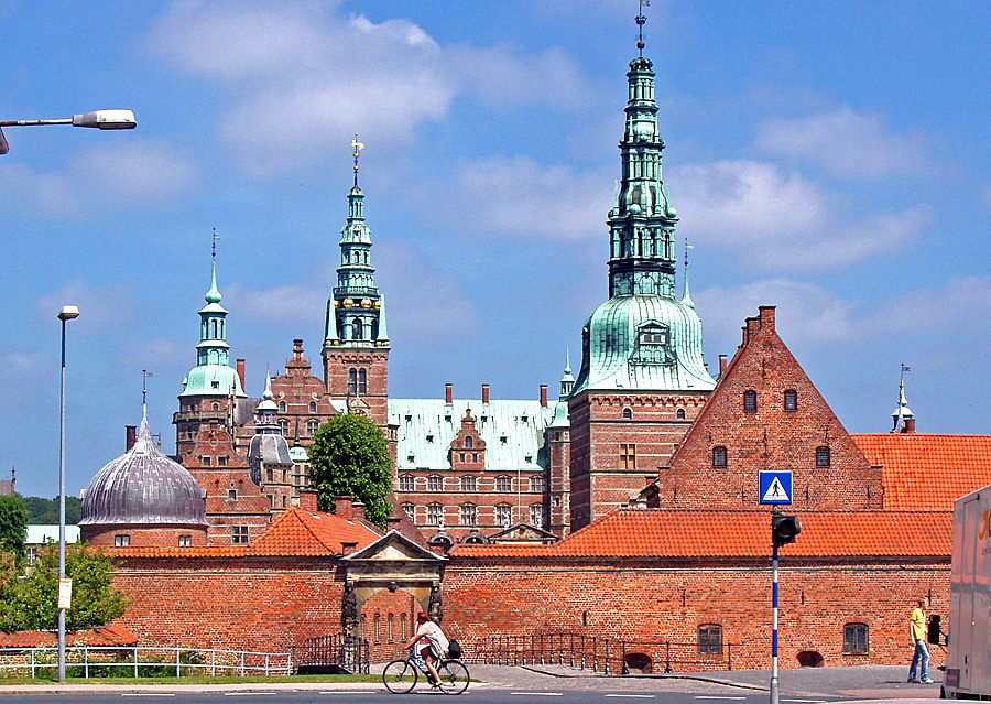 Byporten på Frederiksborg Slot, Hillerød, Denmark. photo by: Nico-dk/Nils Jepsen